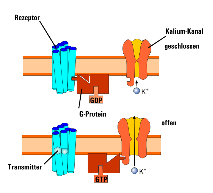 muscarinischer Acetylcholinrezeptor, vermulicher Mechanismus am Herzen. selbst gezeichnet